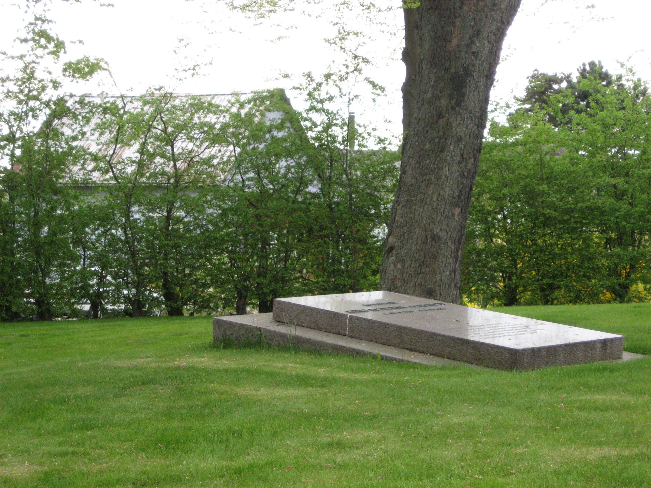 Sønder Aarslev Kirke in Sønder Årslev Sogn, Denmark. Gravestone for painter Jens Hansen-Aarslev (1847-1928).